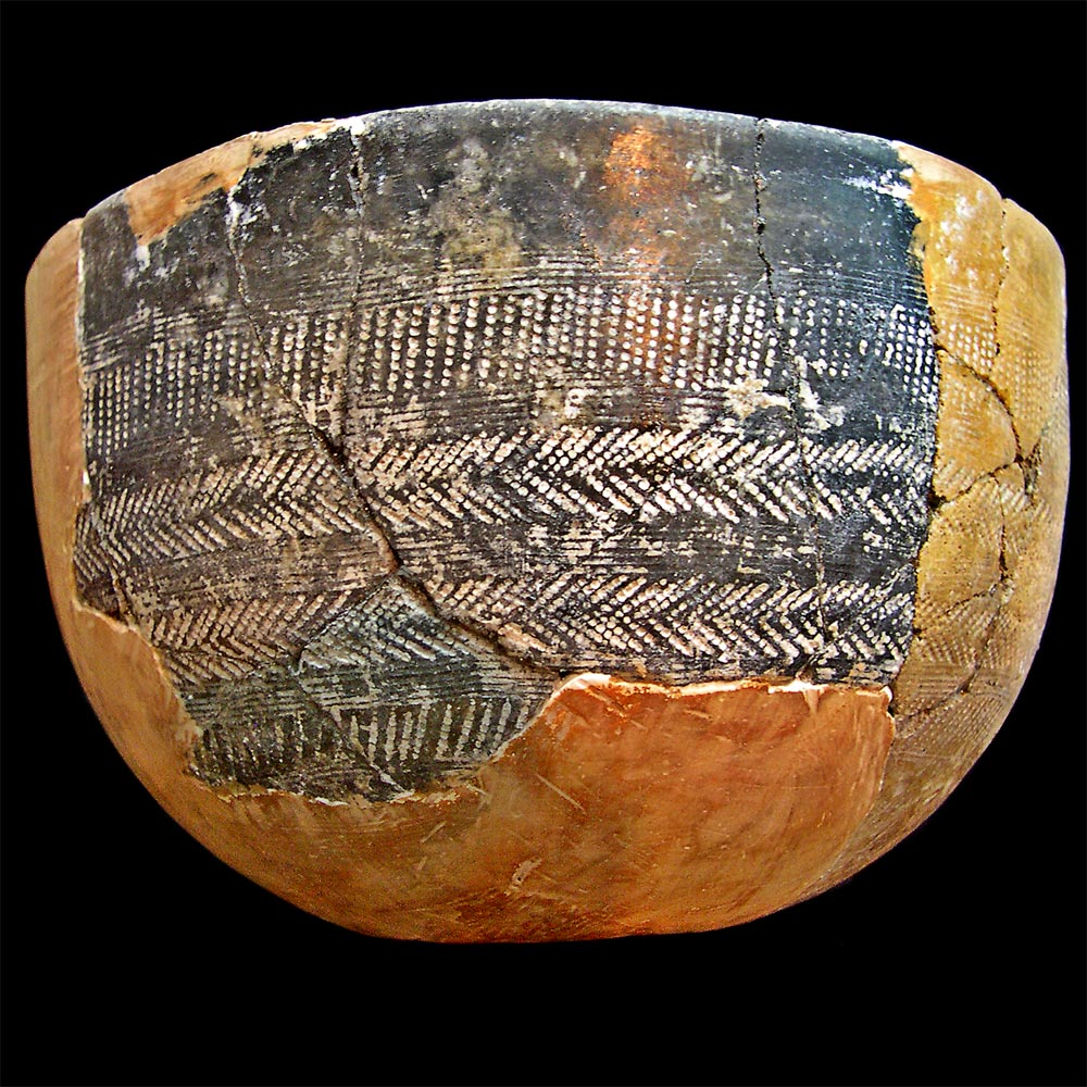 Cerámica decorada «a peine» típica de los inicios de la Segunda Edad del Hierro en la Meseta española, Cultura de las Cogotas-II. Se conserva en el Museo Arqueológico de Valladolid.